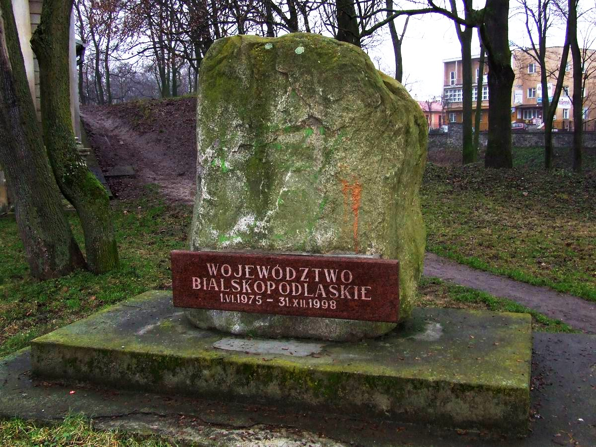 Biała Podlaska. Kamień pamiątkowy przed bramą zamku upamiętniający województwo bialskopodlaskie.